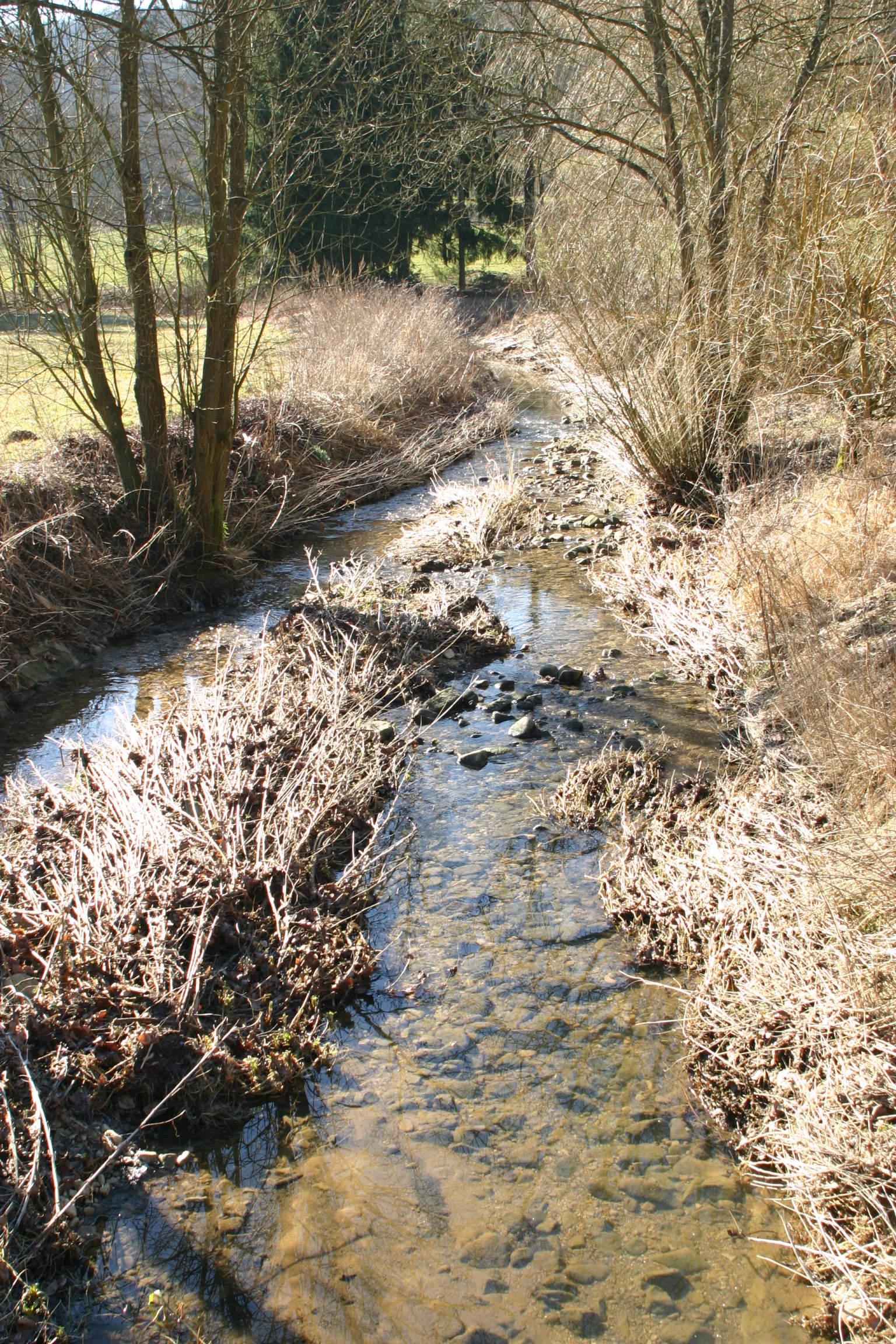 D'Léisbech vun der Bréck vum CR105 gesinn, 150 Meter virun der Mëndung an d'Äisch.